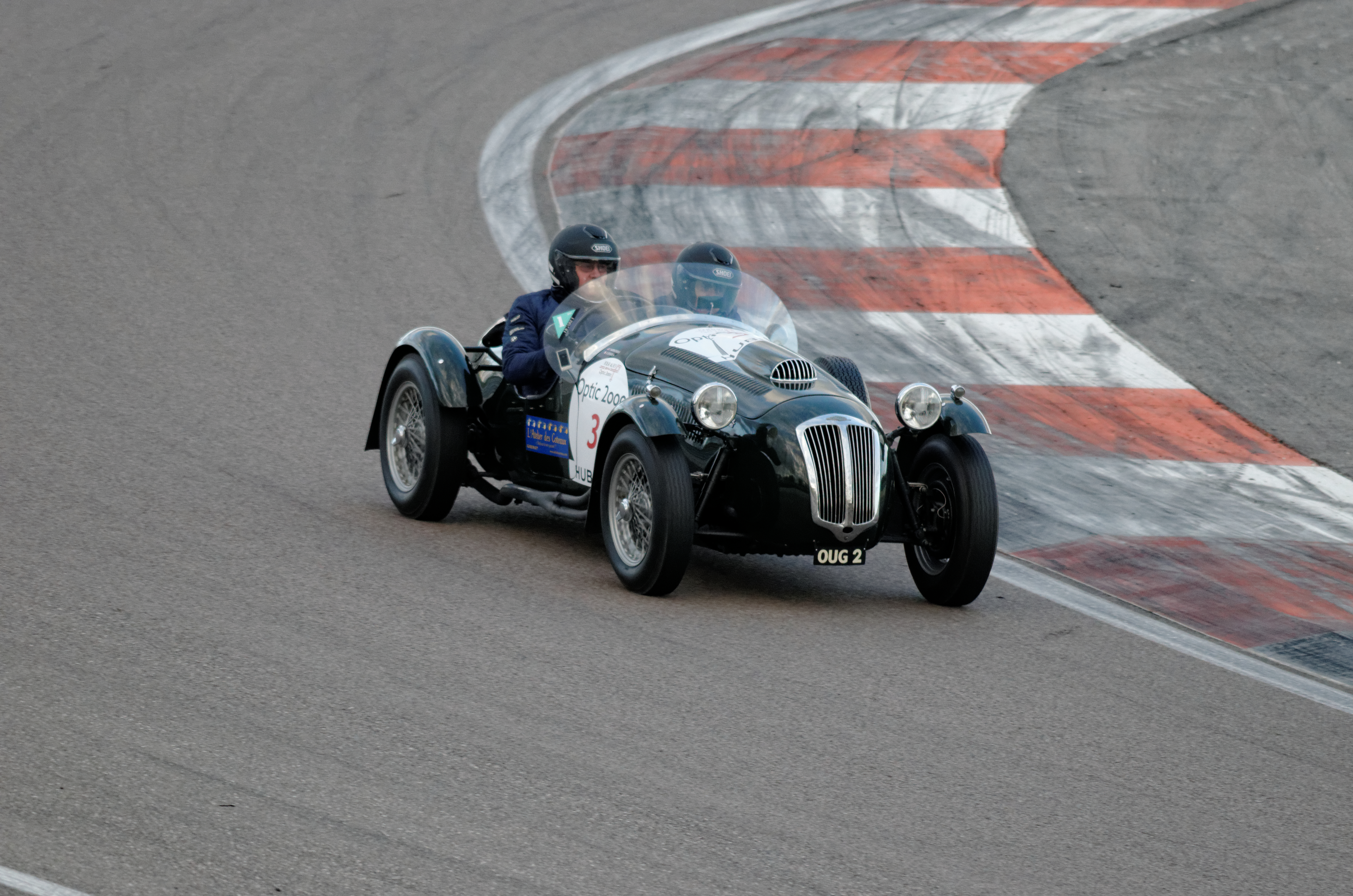 Frazer Nash Le Mans Replica, Tour Auto 2014, étape sur le Circuit de Prenois.